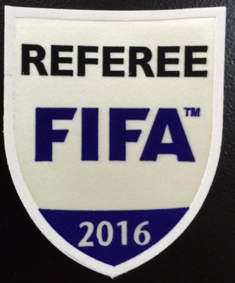 Escarapela FIFA Oficial del Año 2016 que portan los árbitros Categoría FIFA de todos los países